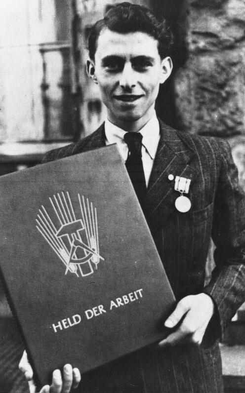 Chemnitz, Auszeichnung "Held der Arbeit" Zentralbild/Seidel Als "Held der Arbeit" ausgezeichnet wurde am Tag der Aktivisten, 13.10.1950, Günther Lieske, Chemnitz, Regensburgerstrasse 56, tätig im Betrieb "Stahlgiessereien Marten A.G.", Chemnitz-Borna. Abgebildete Personen: Lieske, Günther: Stahlgießerei Marten AG Chemnitz-Borna, DDR